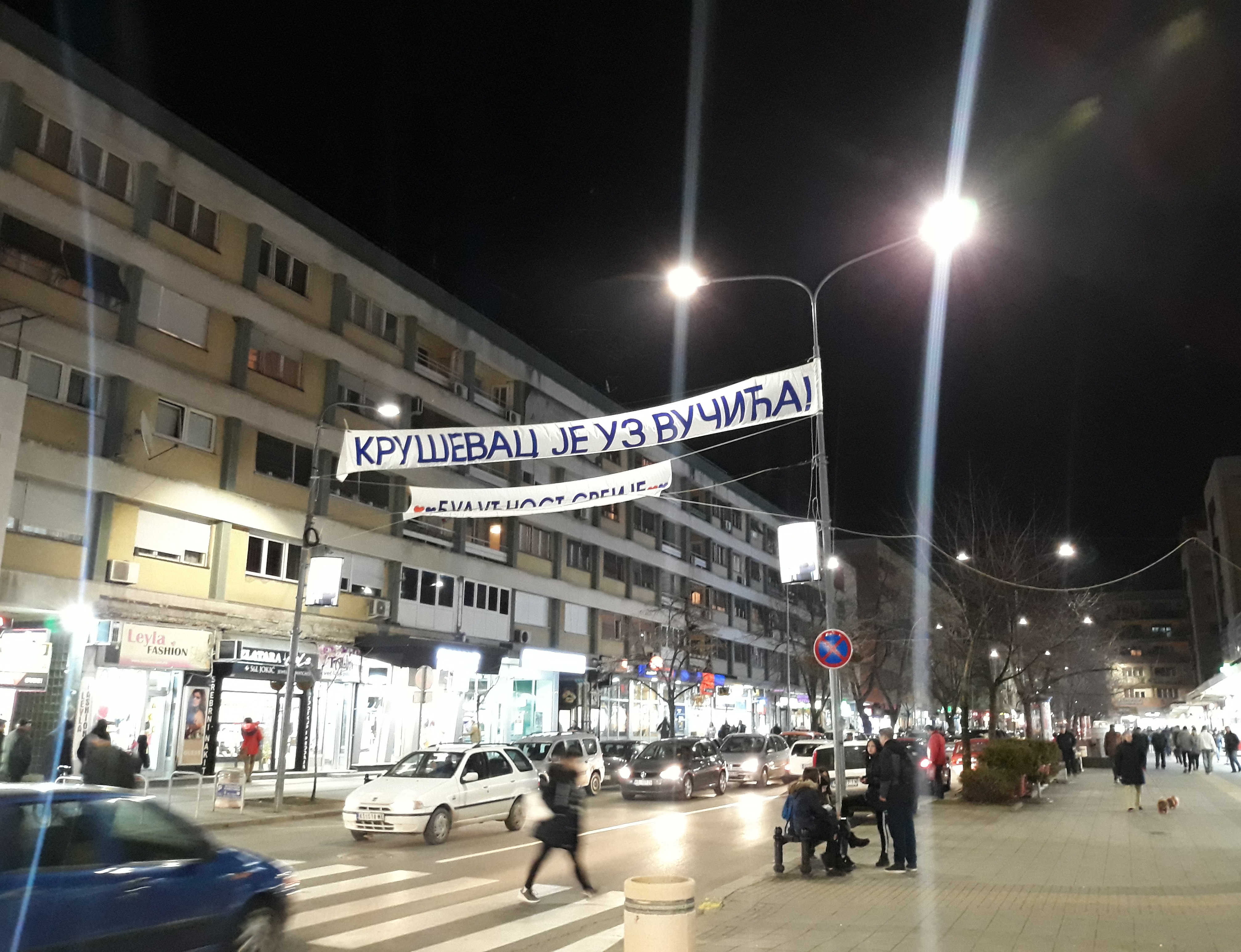 Транспарент посвећен Александру Вучићу у центру Крушевца, фебруара 2019.